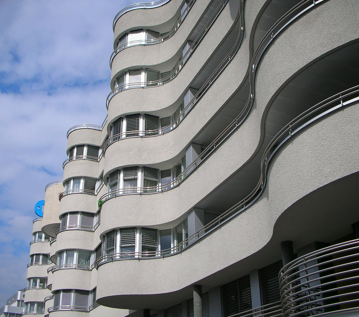 Wohnpark Binzmühle in Zürich Oerlikon by architect Justus Dahinden